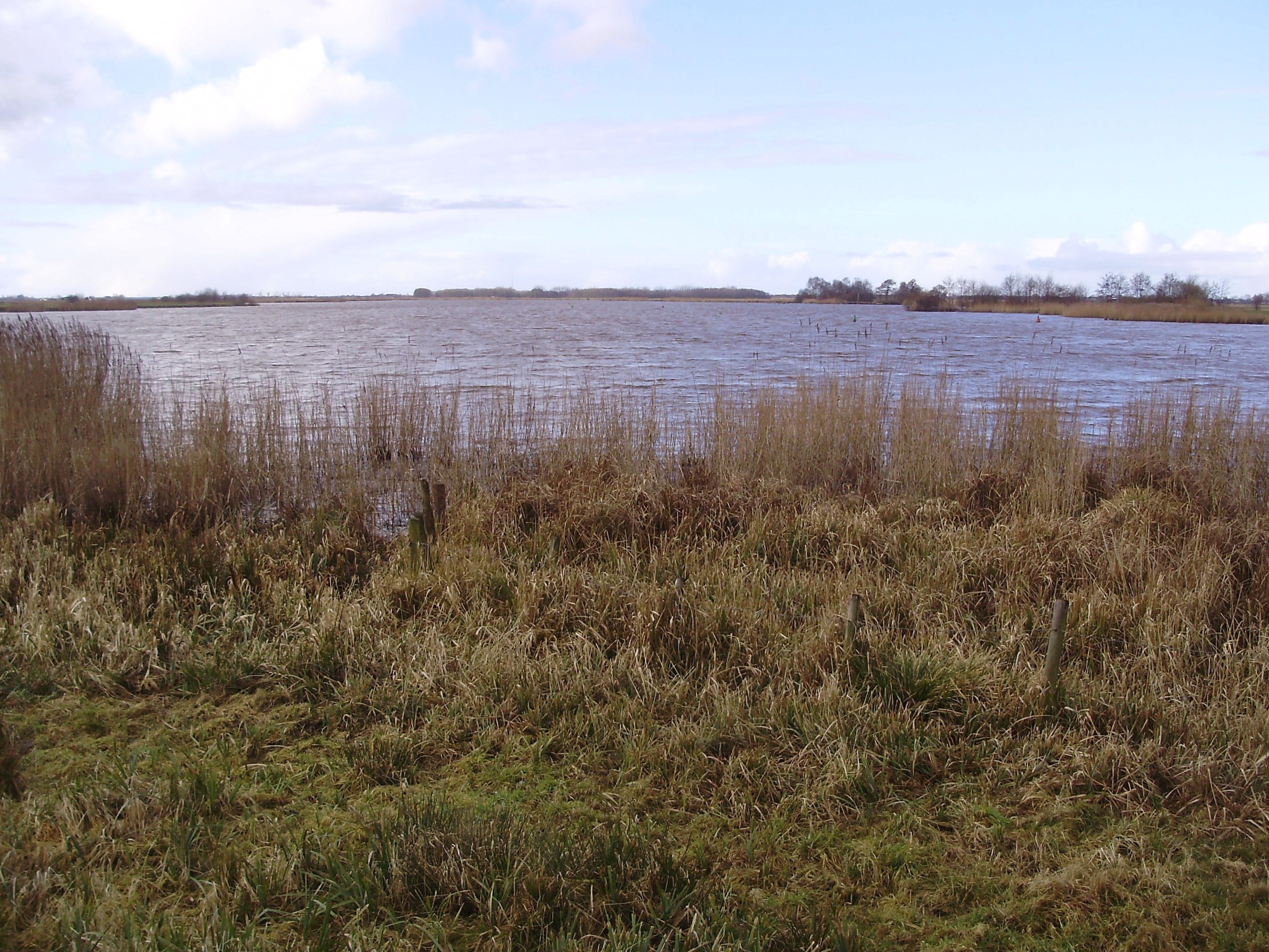 Het Wijde in gemeente Weststellingwerf/Steenwijkerland (Nederland)